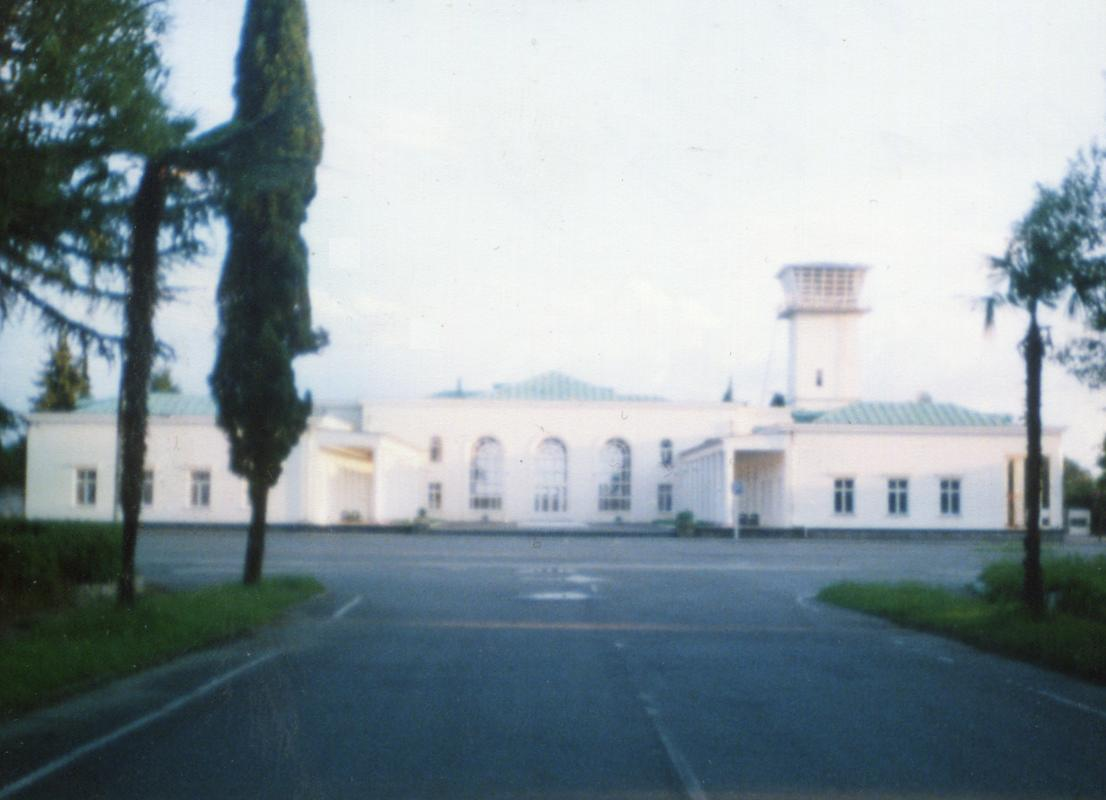 Старое здание аэровокзала